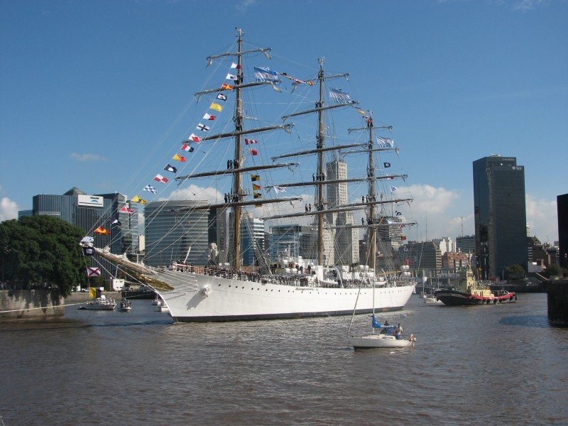 Fragata (Q-20) ARA "Libertad"